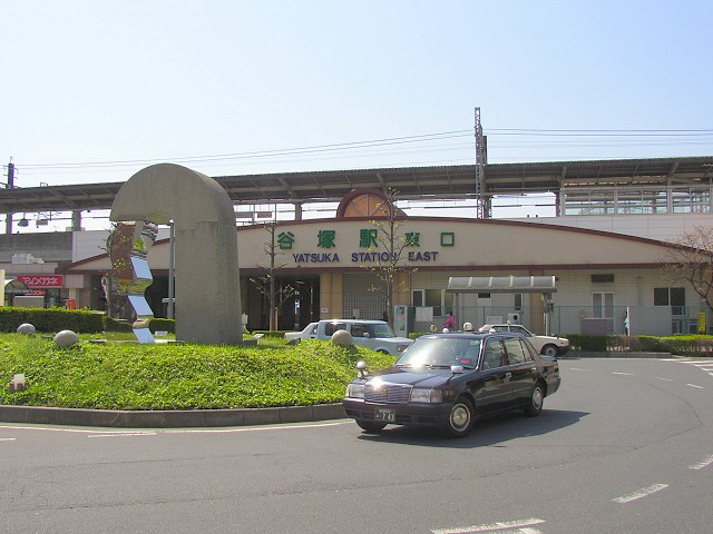 谷塚駅東口